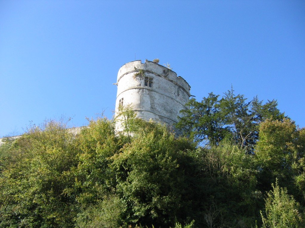 Château de Tancarville, Seine-Maritime, Haute-Normandie